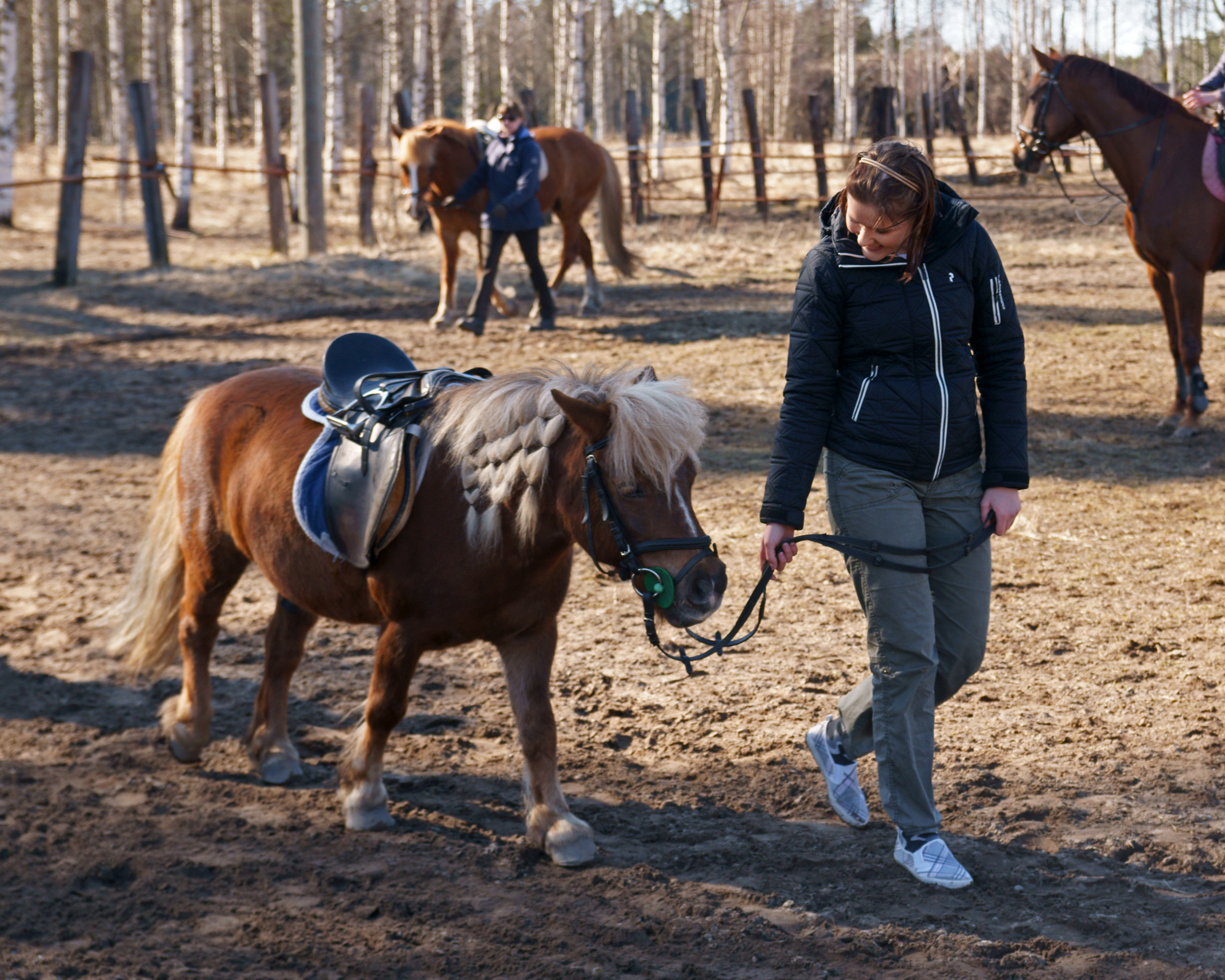 Teppo lämmittelemässä ennen esteratsastuskilpailua.